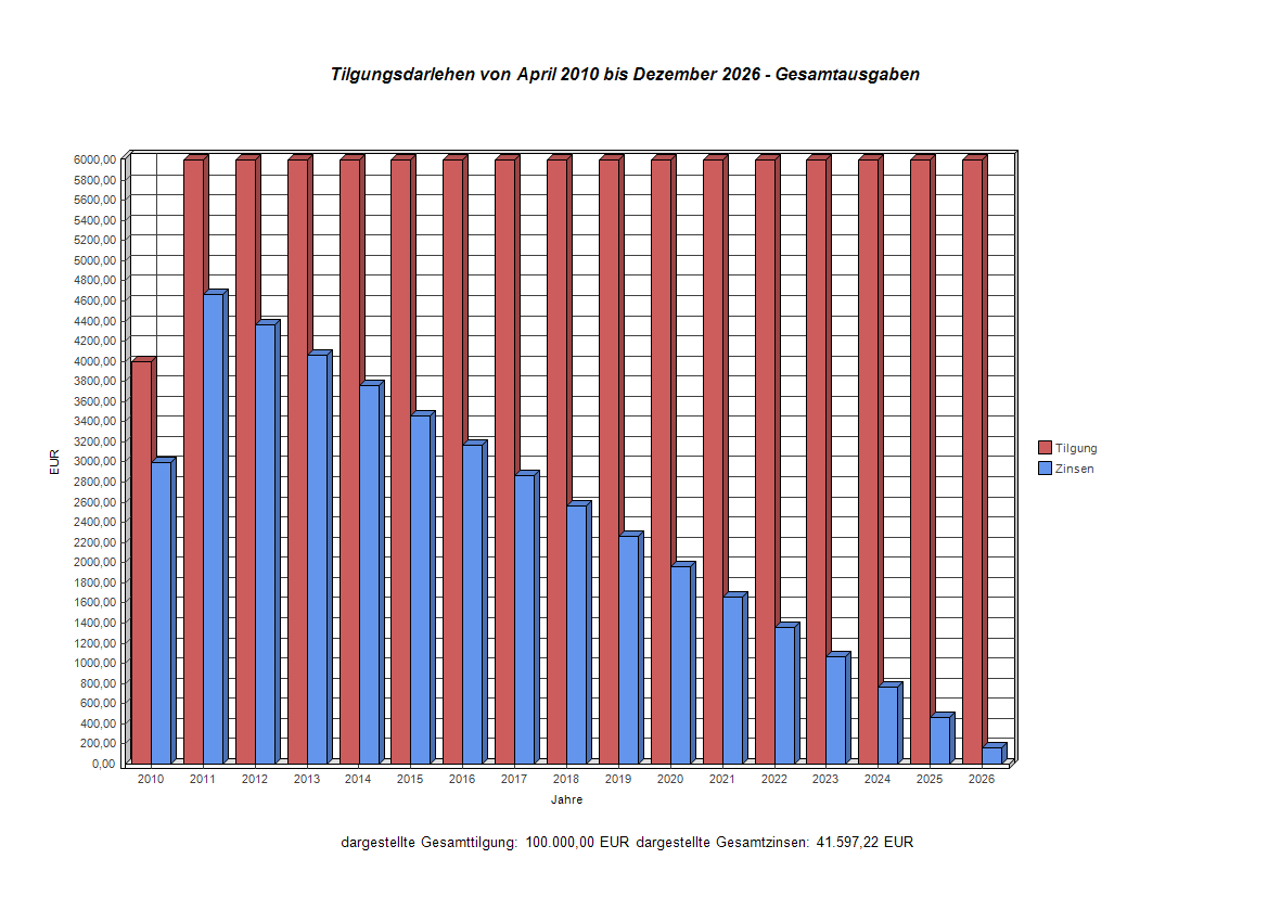 Grafische Darstellung eines Tilgungsdarlehens über 100 T€ - fester Tilgungsatz 500 € / mtl.